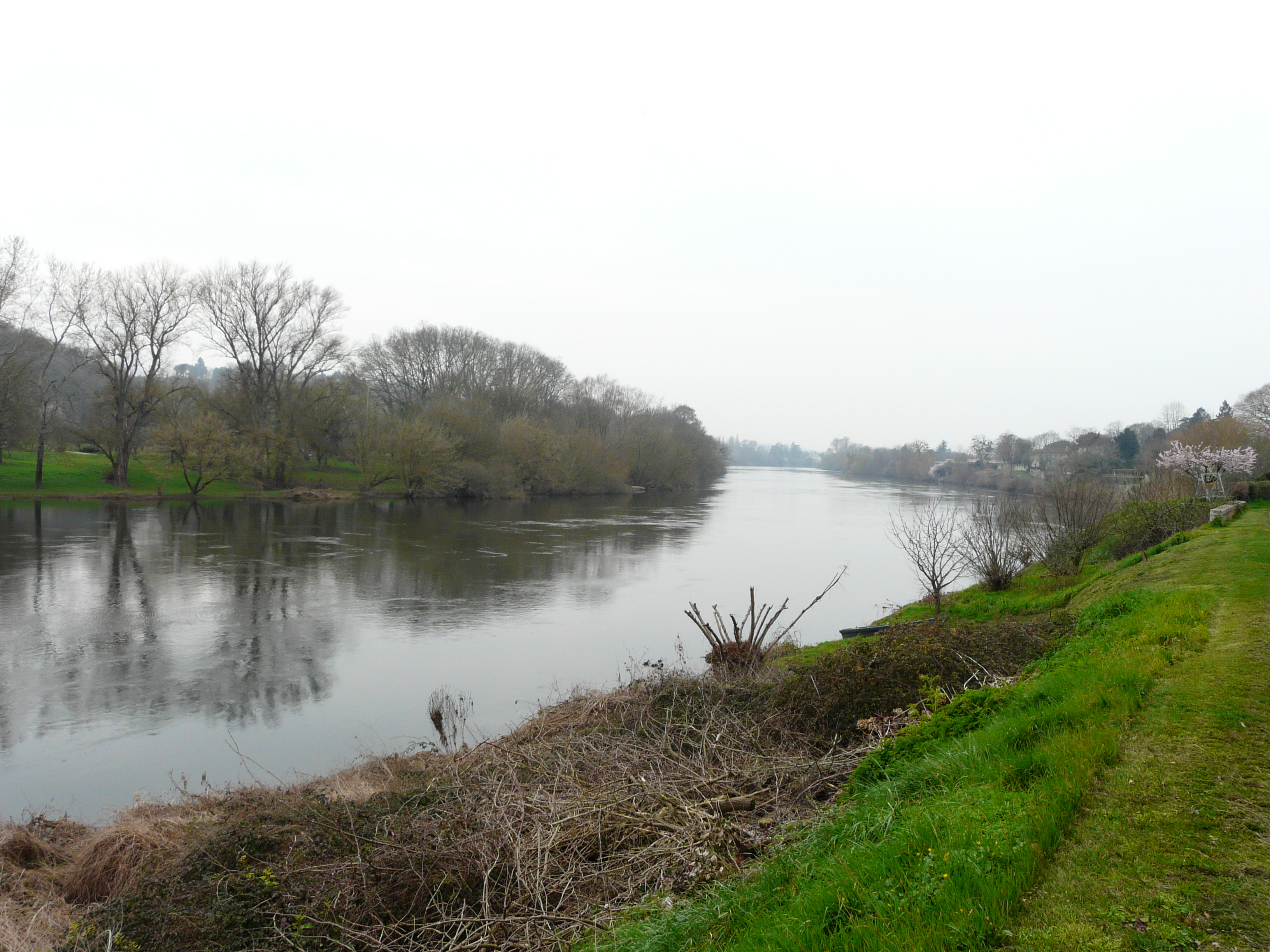 La Dordogne au lieu-dit Prats, Saint-Seurin-de-Prats, Dordogne, France. Sur la rive opposée, commune de Juillac, Gironde.Vue prise en direction de l'aval.